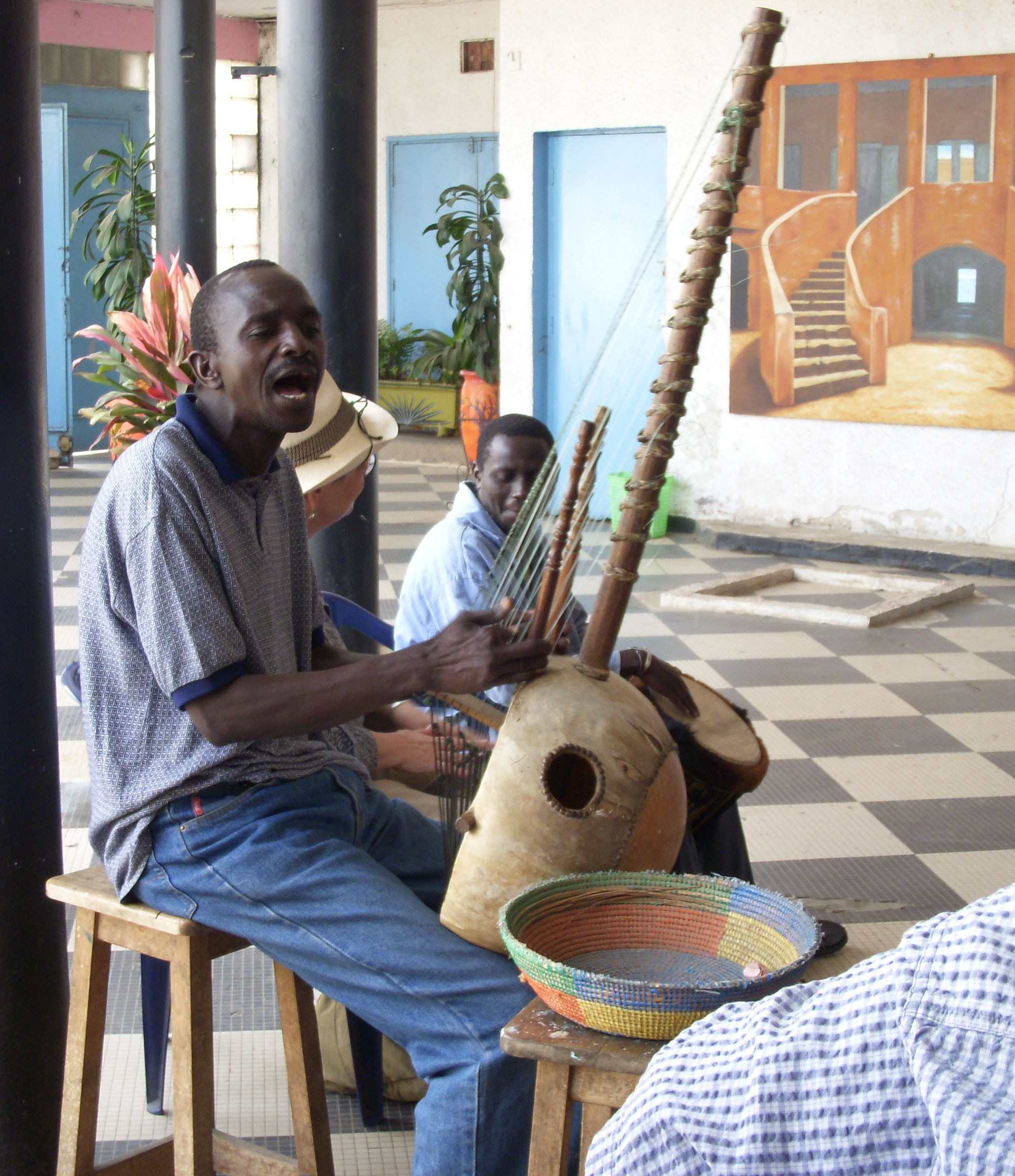 Joueur de kora à Dakar, Sénégal